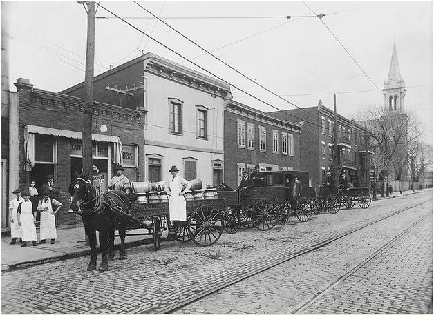 L'arrivée du lait au Comptoir coopératif de Montréal Adresse : 1135, avenue Papineau